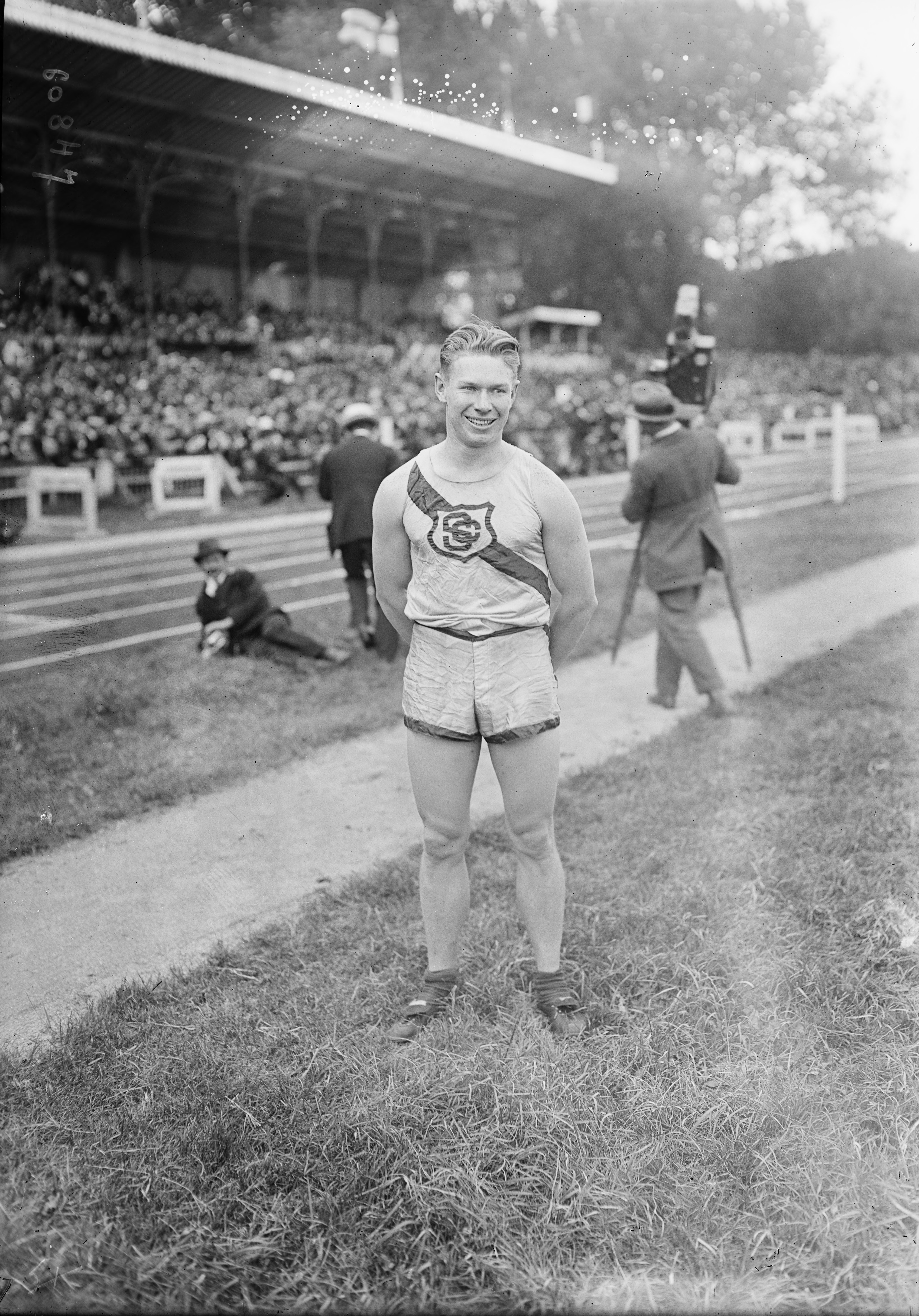 29-8-20, Colombes, portrait de Charles Paddock (Américain) vainqueur du 100 m.